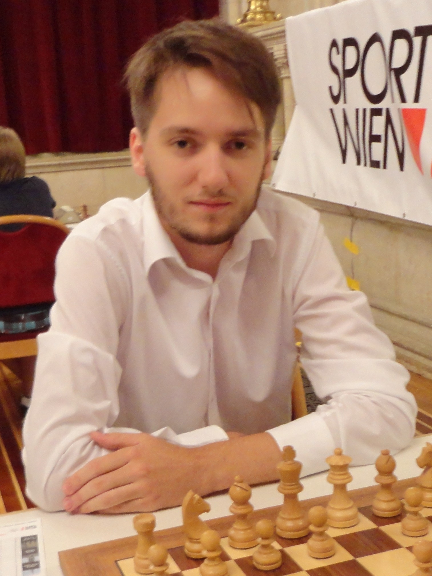 Peter Schreiner (Schachspieler), Vienna Chess Open 2015 in Wien.